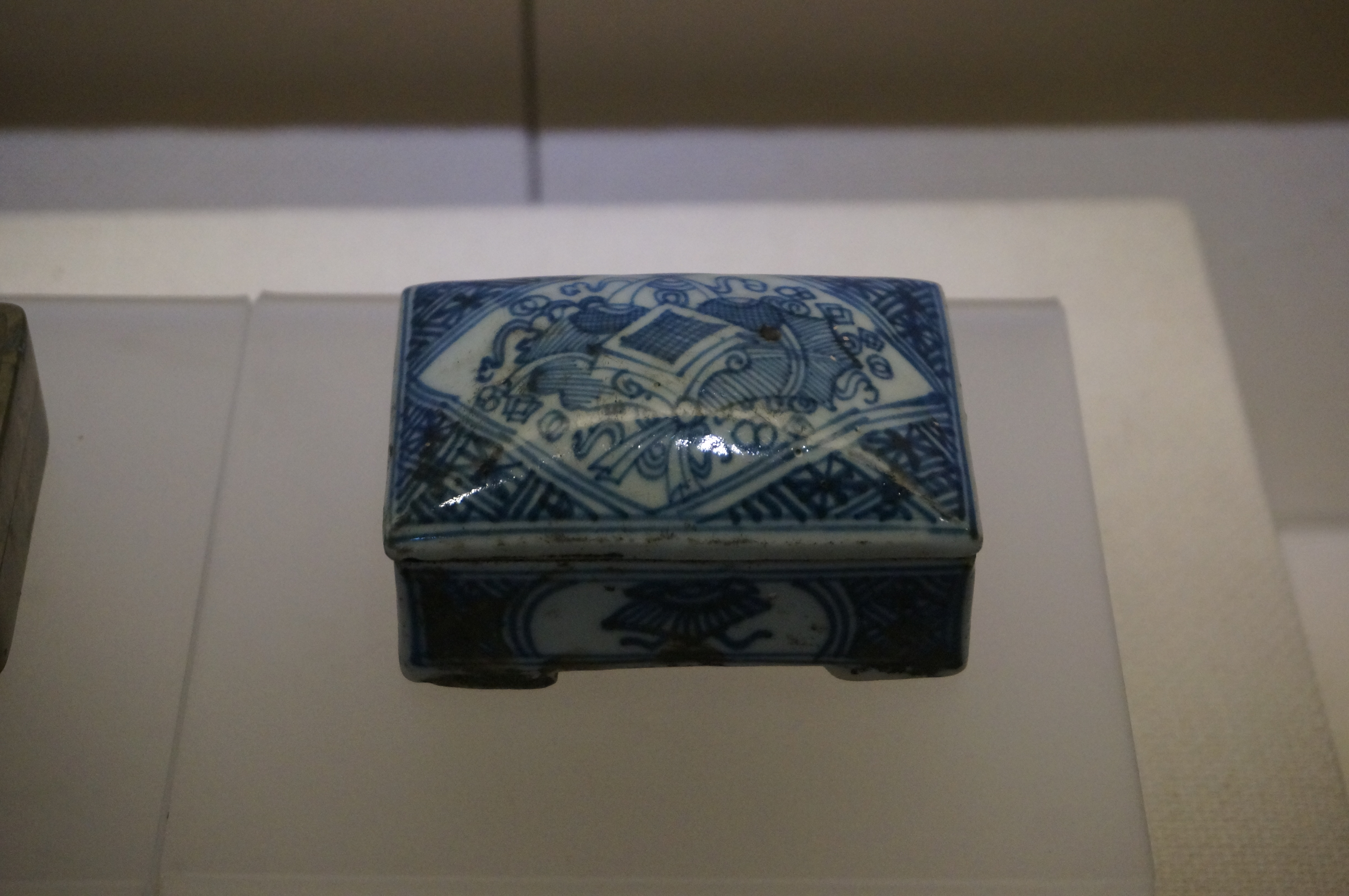 清代青花杂宝纹墨盒。